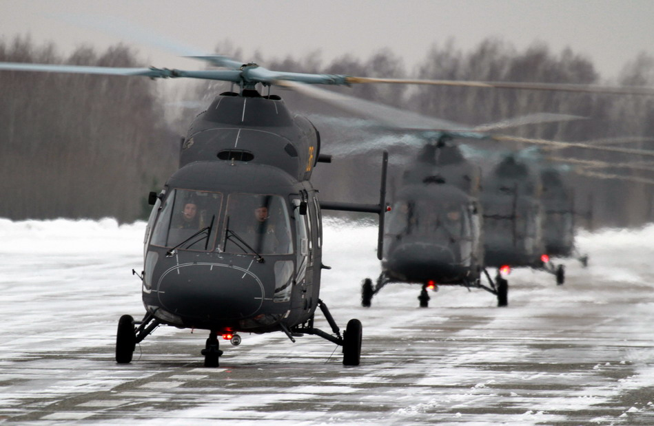 Строй вертолетов Ансат-У